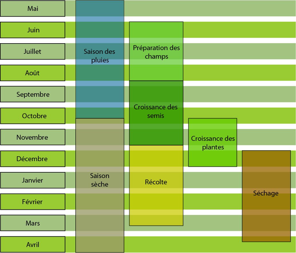 Le déroulement de la culture du tabac cubain.